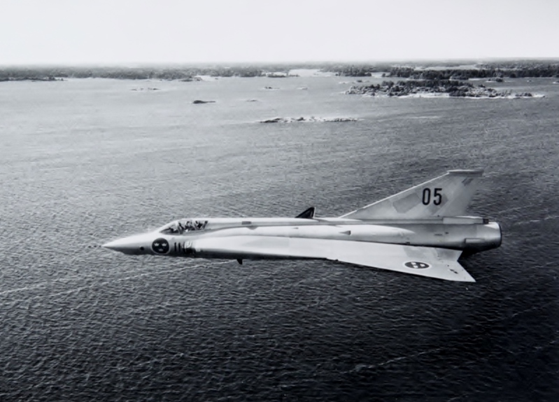 Saab S 35E Draken (35905) godkändes hos Flygvapnet 28 september 1965. Individen kom under dess aktiva tid att vara märkt med 11-05 och 21-55. Kasserad 14 april 1980 och senare såld till Danmark som reservdelsobjekt.